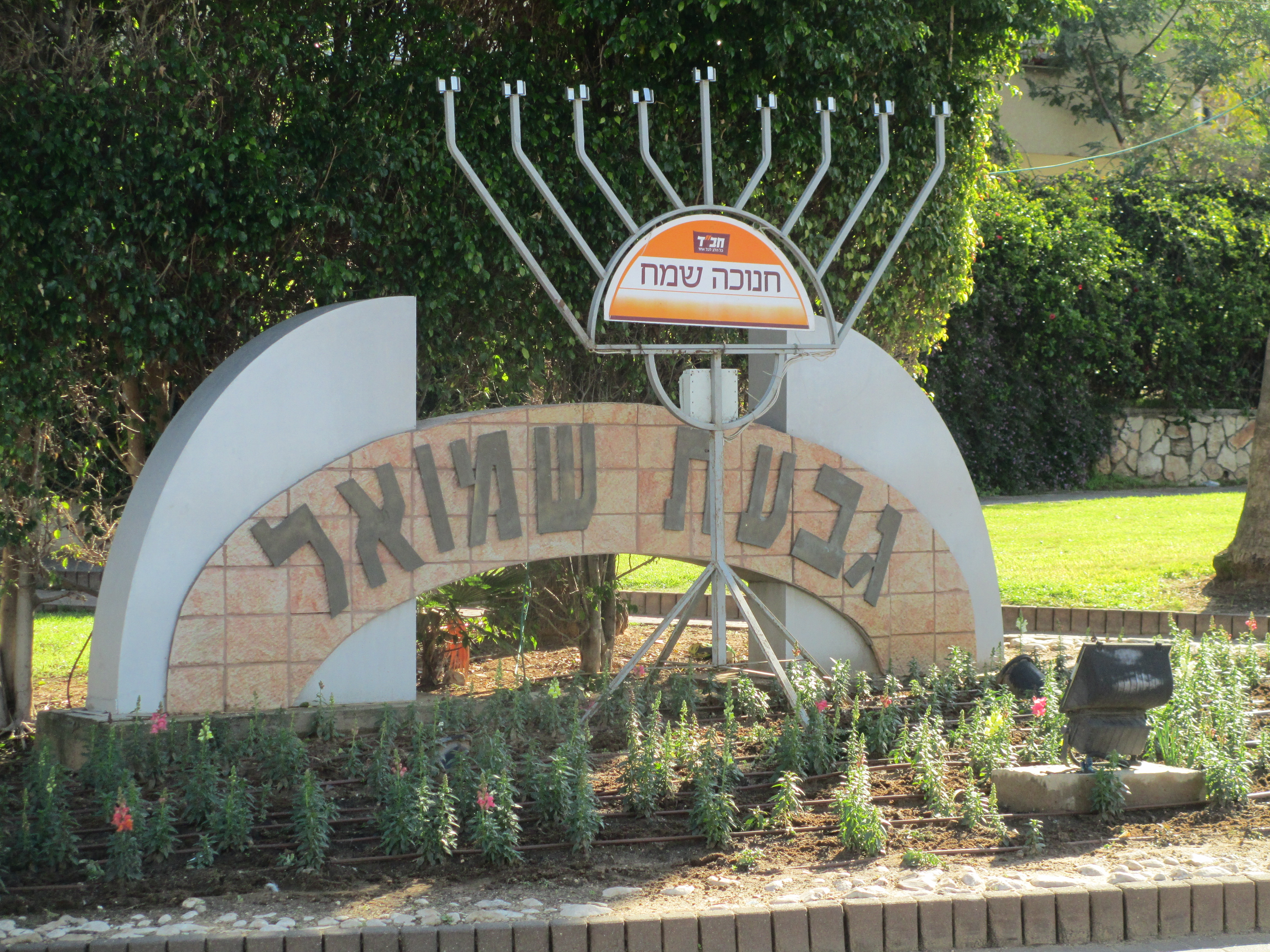 שלט בכניסה לגבעת שמואל